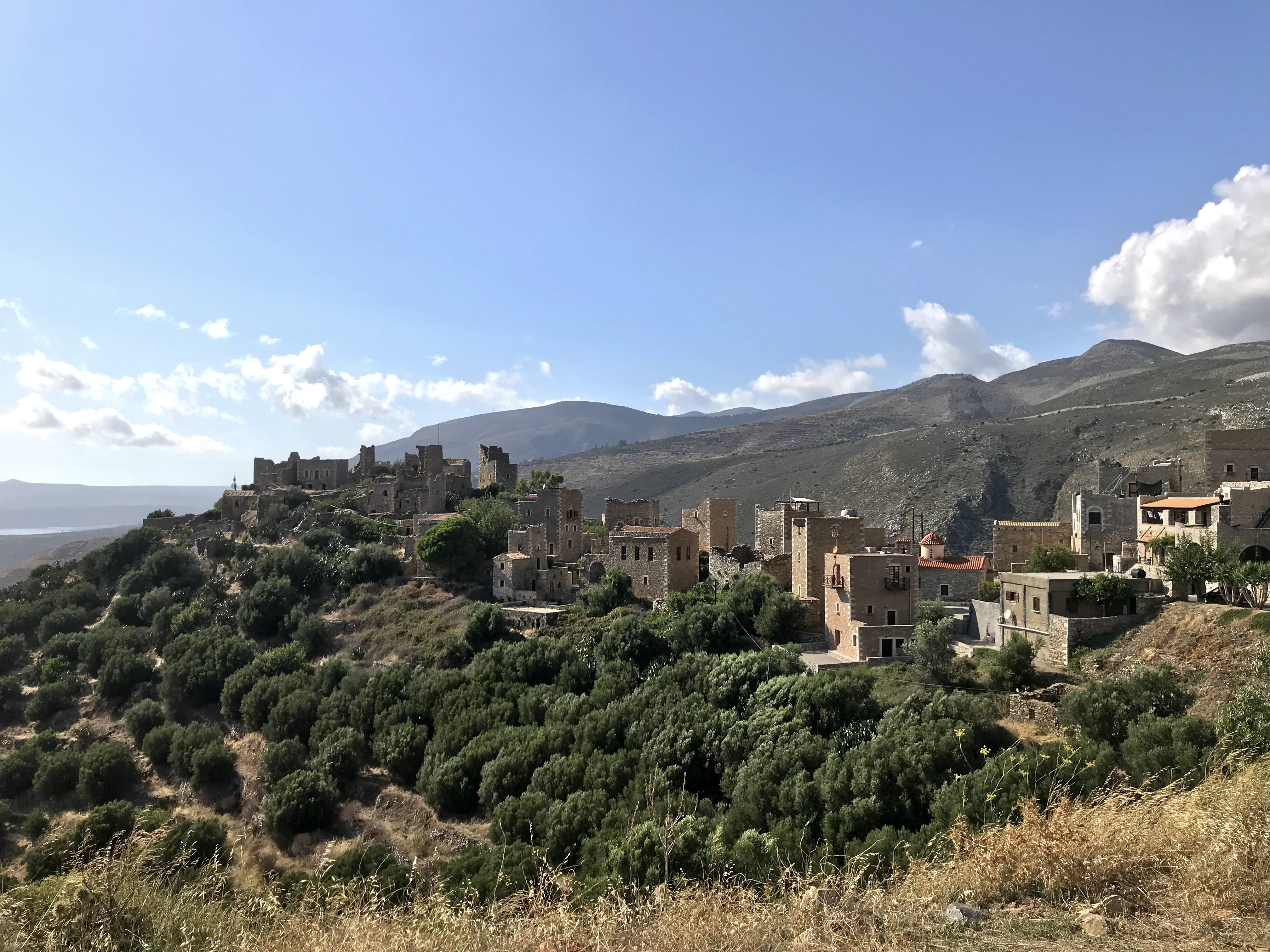 άποψη από τη Νότια πλευρά του οικισμού.